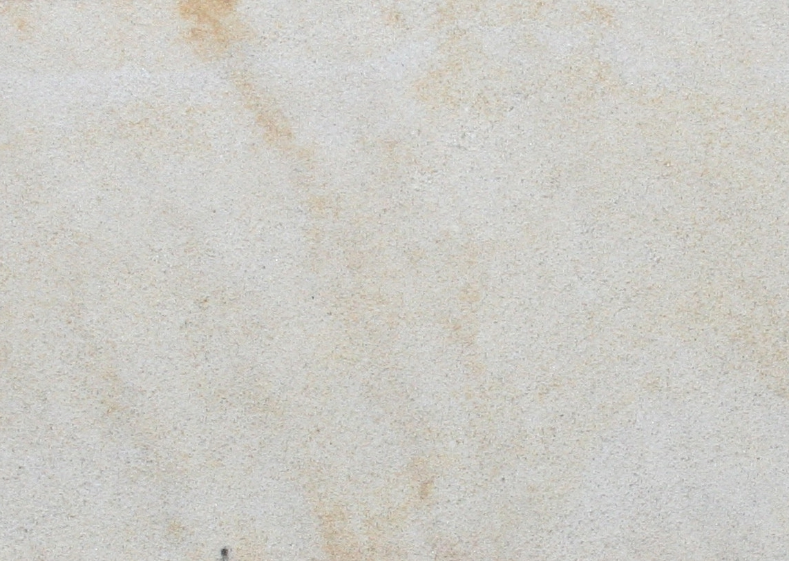 Bentheimer Sandstein: Muster ca. 14 x 8 cm